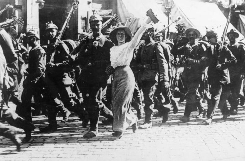 I. Weltrkieg, Mobilmachung Zentralbild / dpa 28.7.1954 I. Weltkrieg 1914 - 18 Zum Kriegsausbruch am 1. August 1914 U.B.z.: Der Auszug deutscher Soldaten aus ihrer Garnisonsstadt